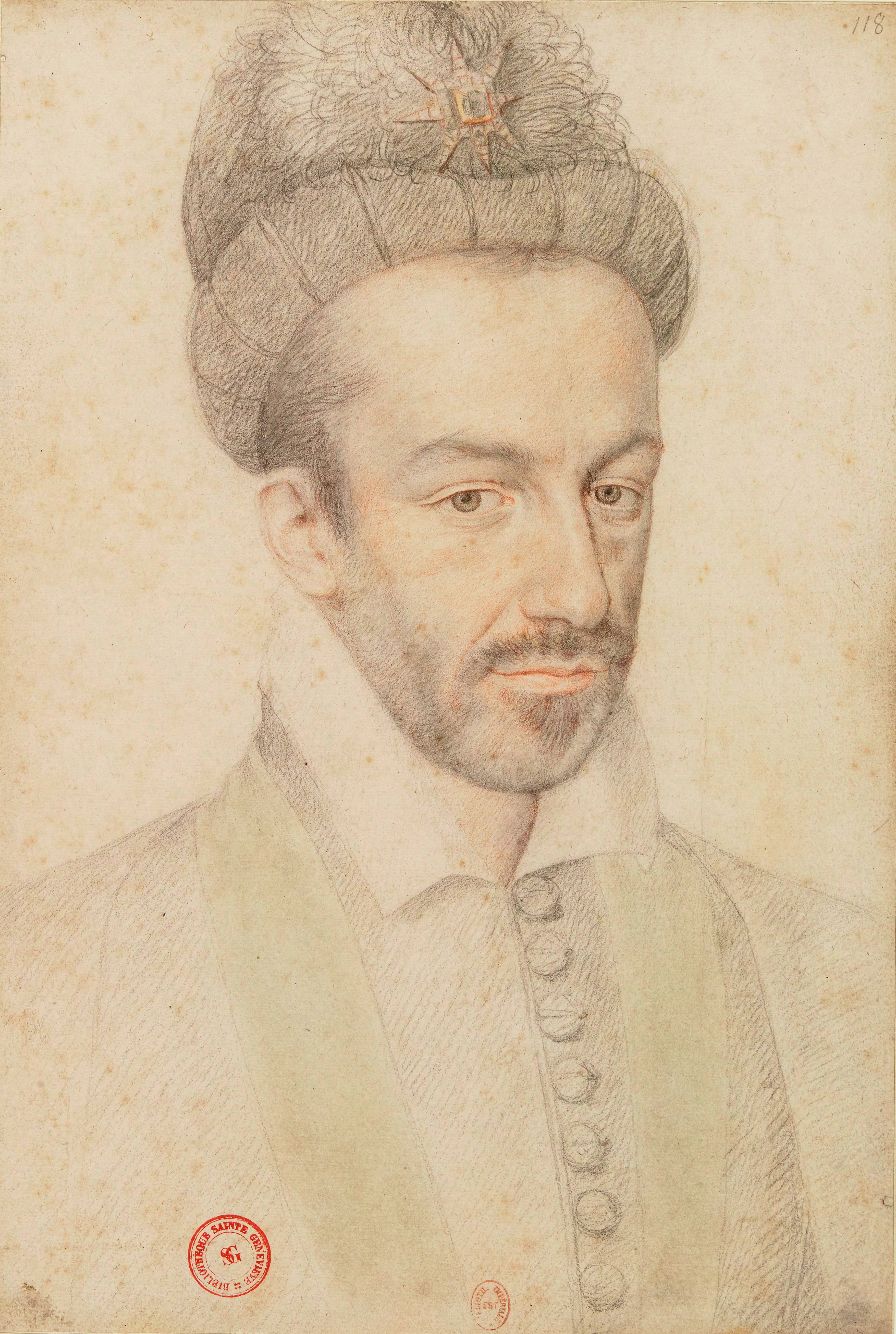 Portrait au crayon du roi Henri III, par Jean Decourt (anciennement attribué à Étienne Dumonstier).